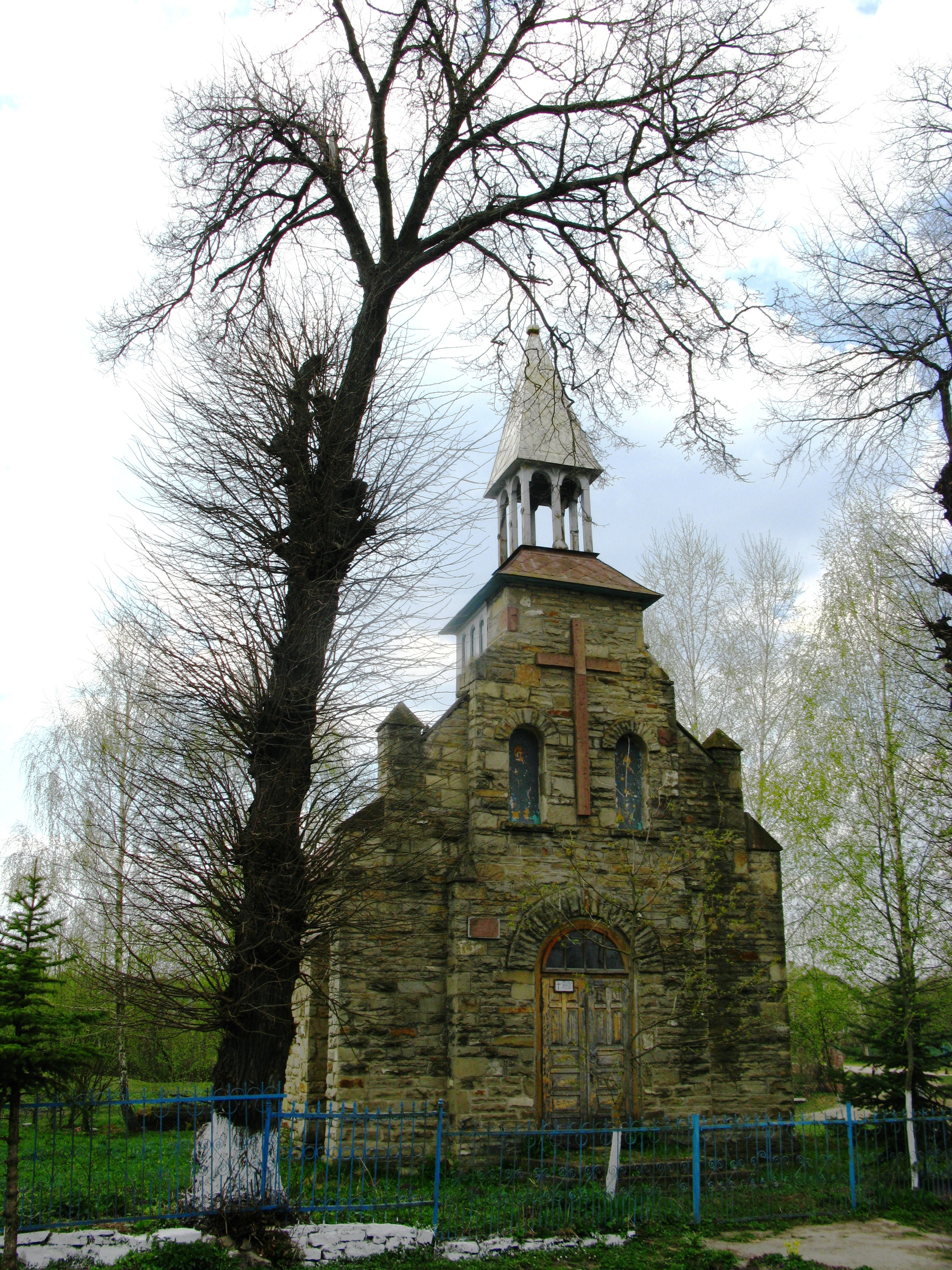 Костел, Залав'є